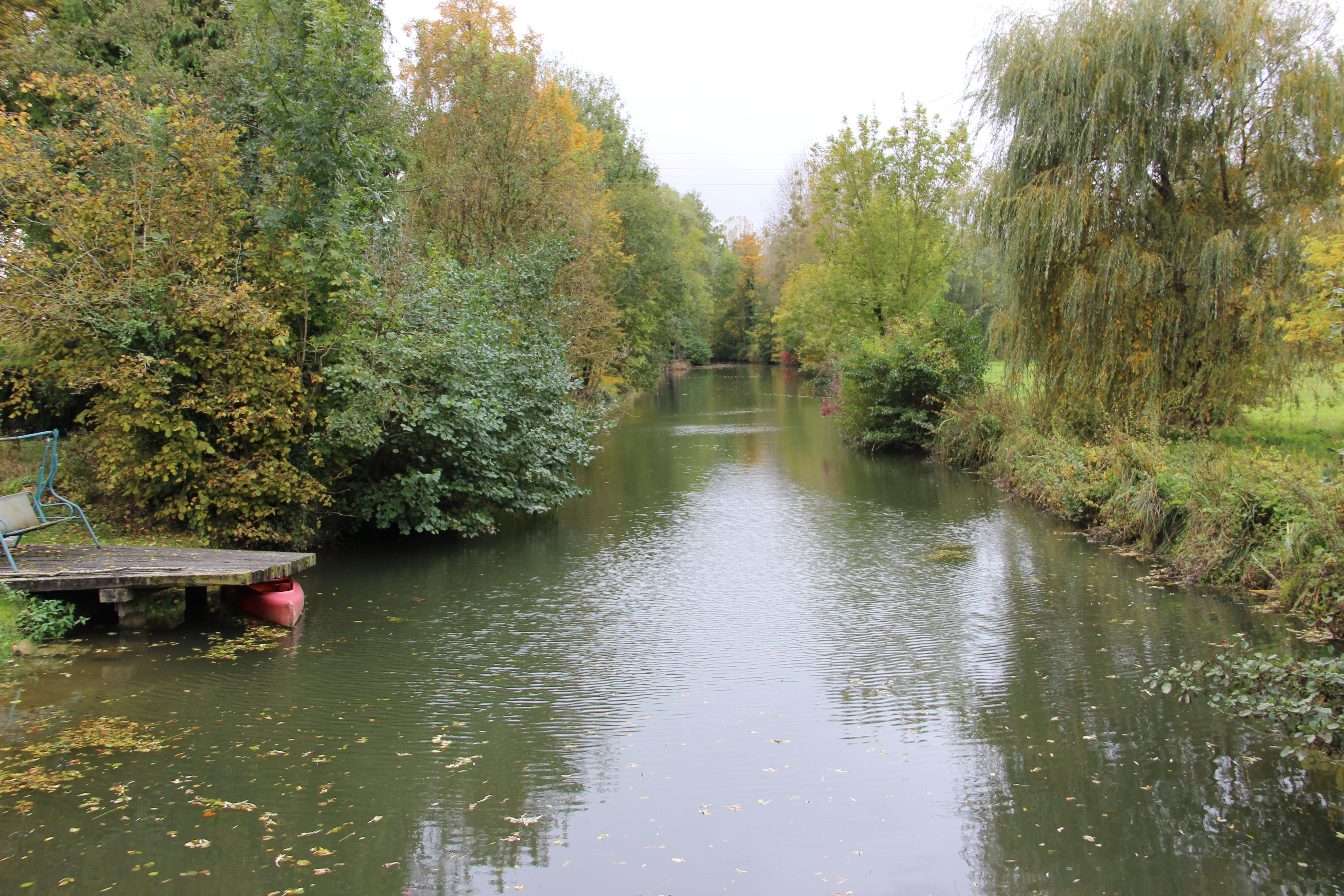 La Chée à Outrepont (51)